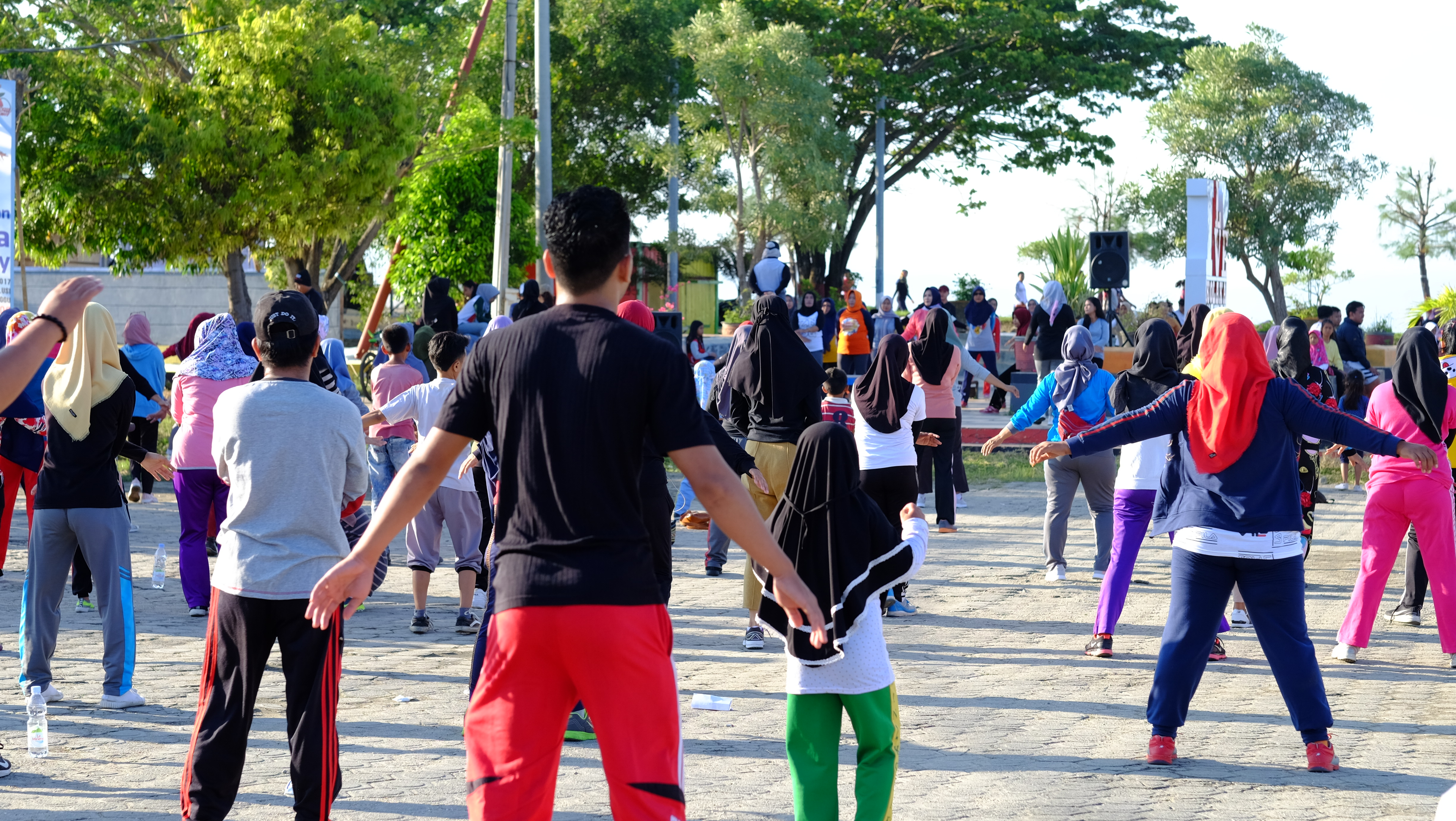 Aktivitas CFD Hari Minggu di Pantai Mandra Kolaka